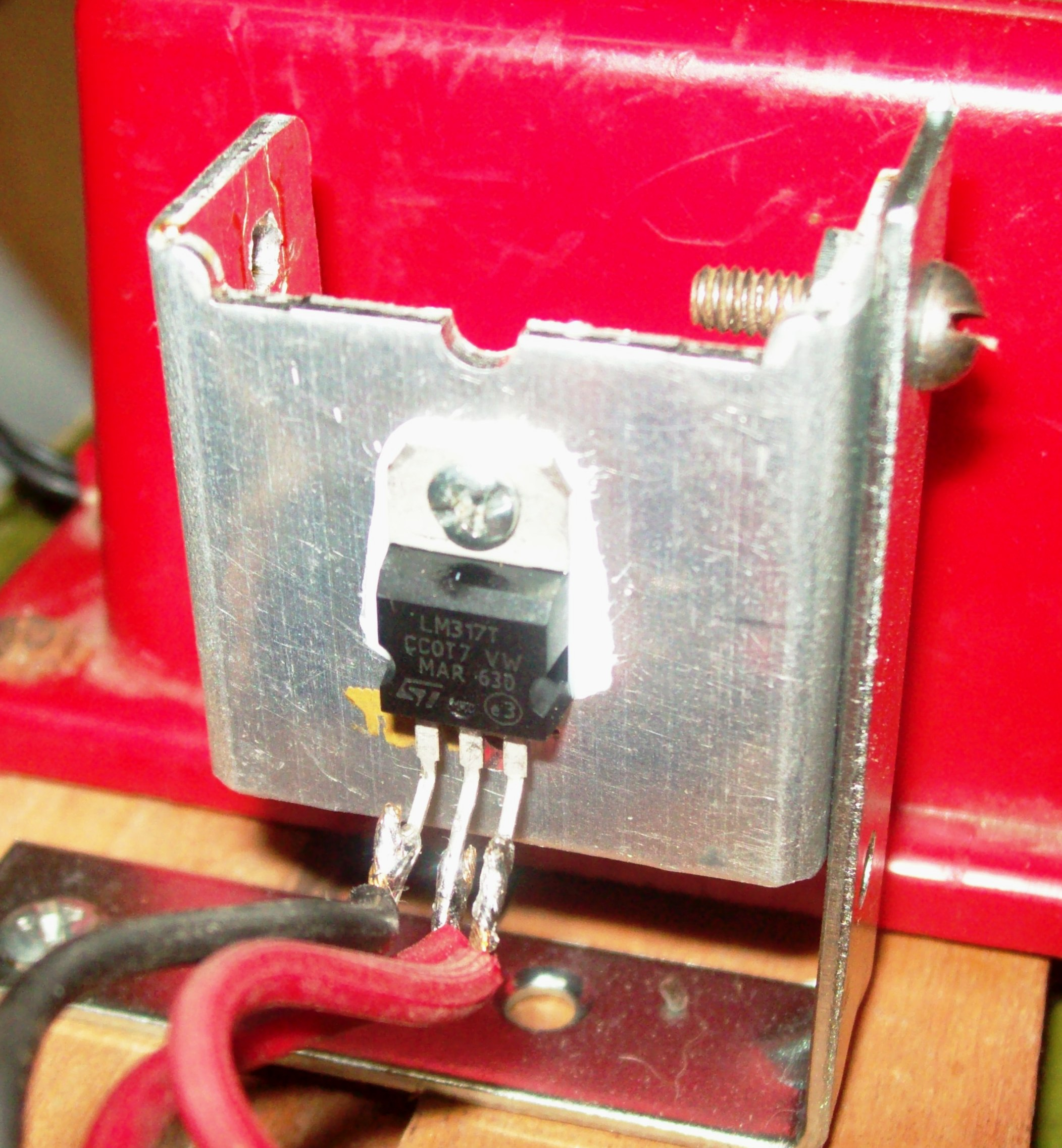 Foto del regulador de tensión LM317 montado en un disipador.